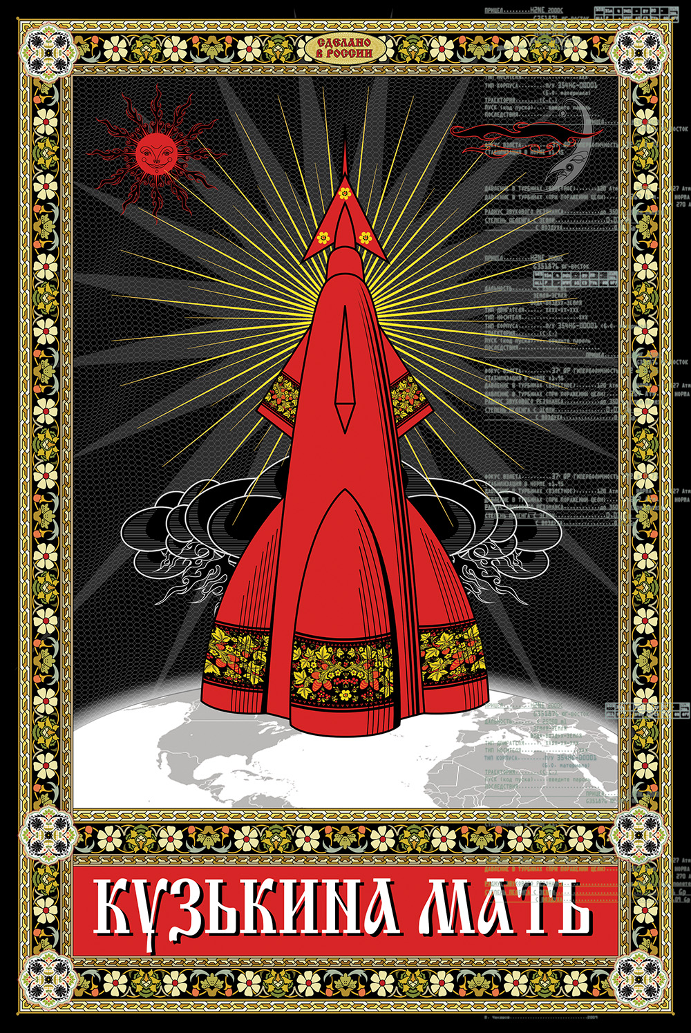 КУЗЬКИНА МАТЬ. Оригинальная и комп. графика, 100х150 см. 2009 г